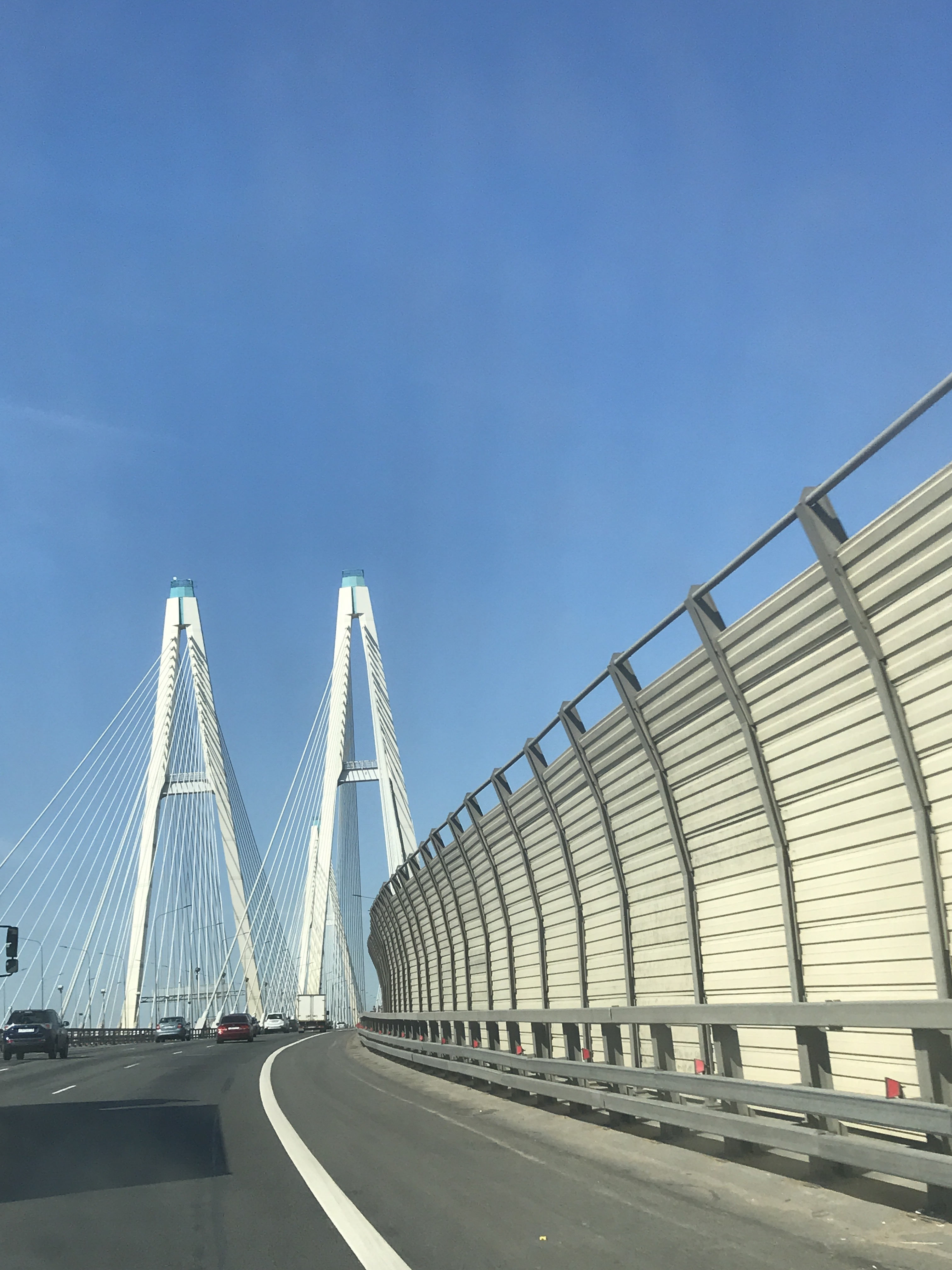 КАД